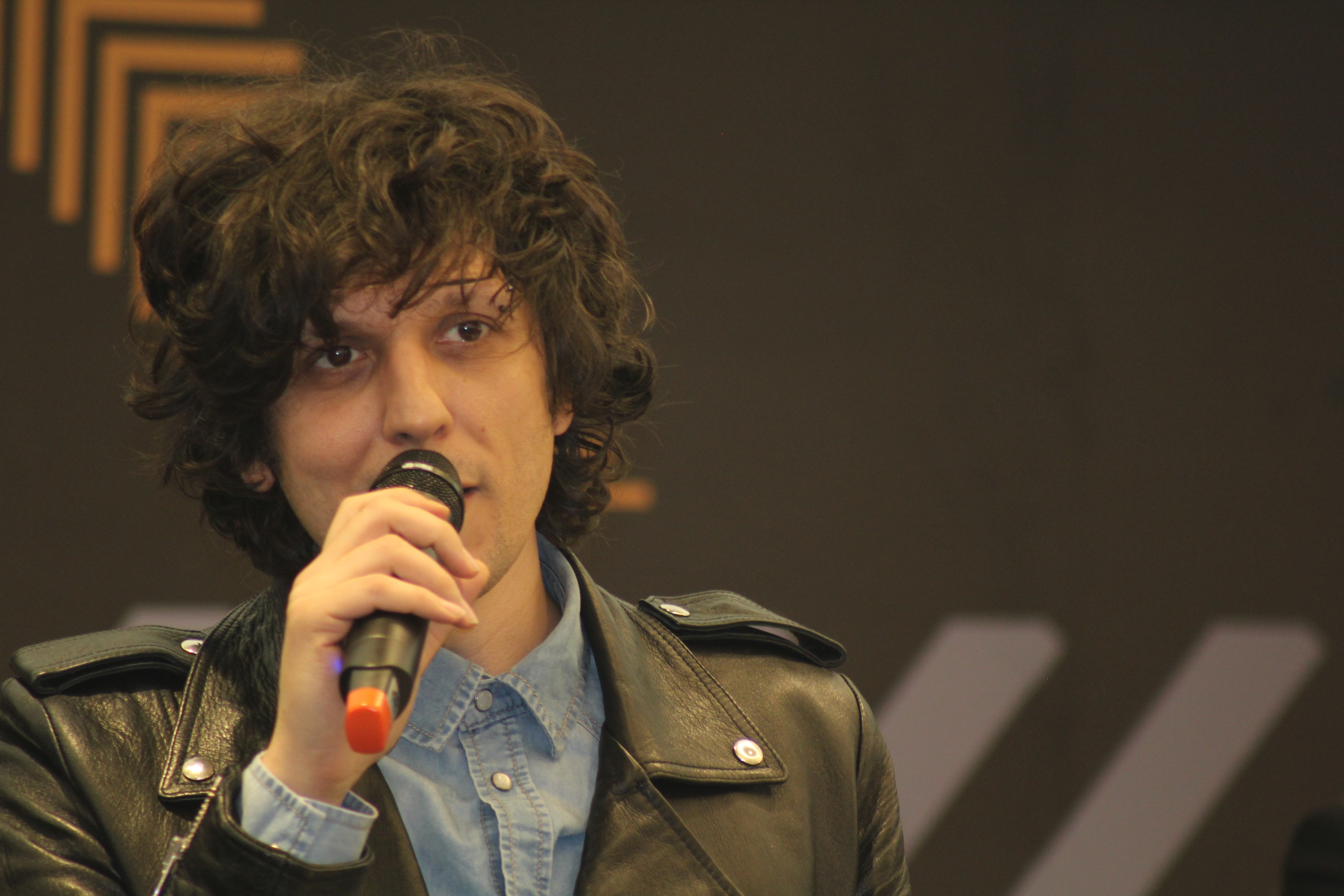 Ermal Meta - Centro Commerciale MareMonti Massa (MS)